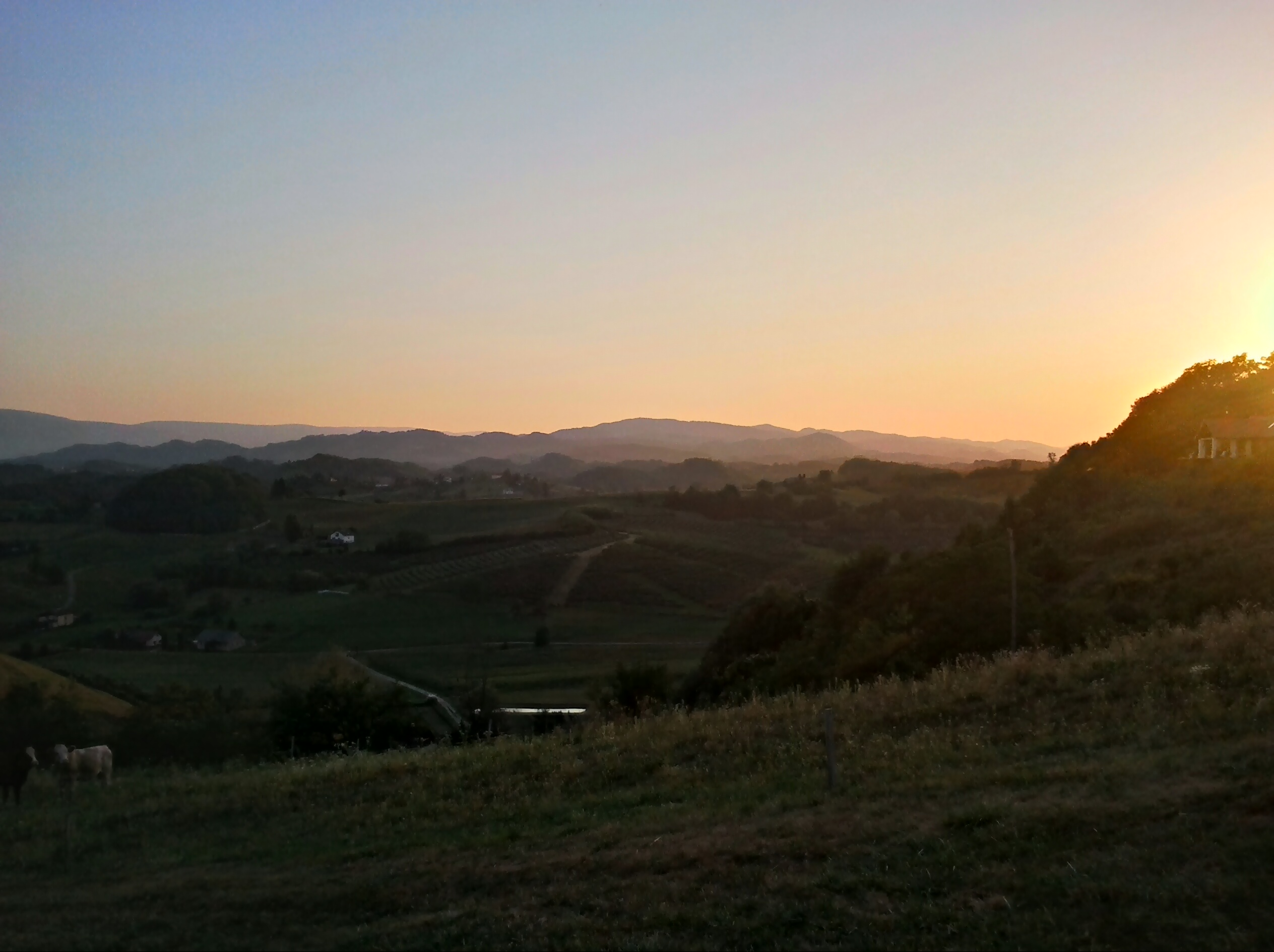 Vukovski vrh